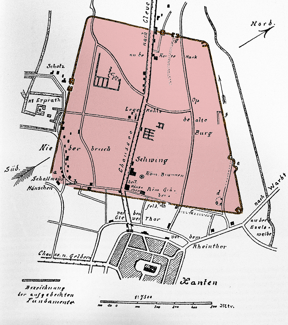 Stadtmauer der Colonia Ulpia Traiana auf einem Plan von 1889, nachkoloriert